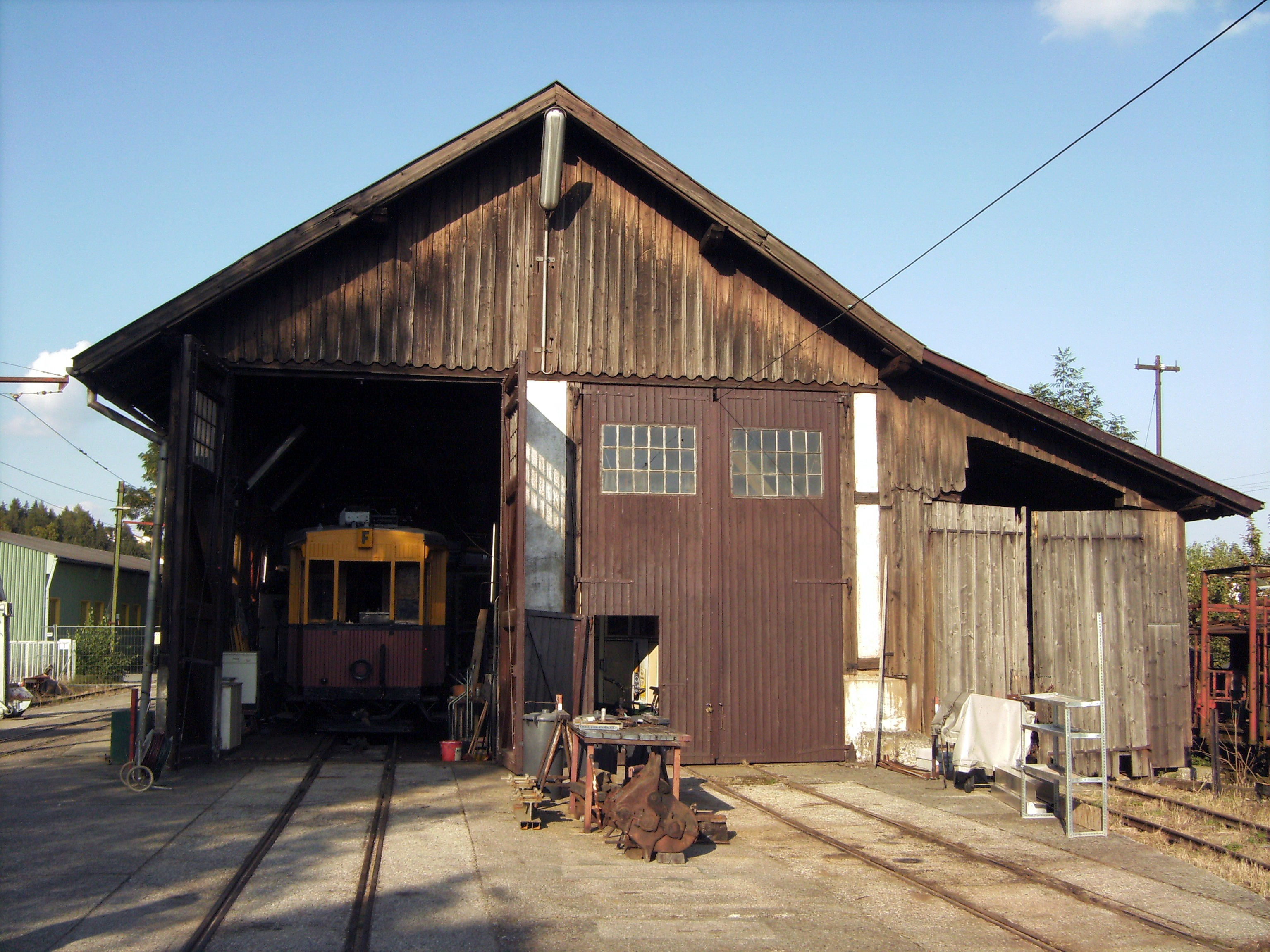 Remise der Florianerbahn